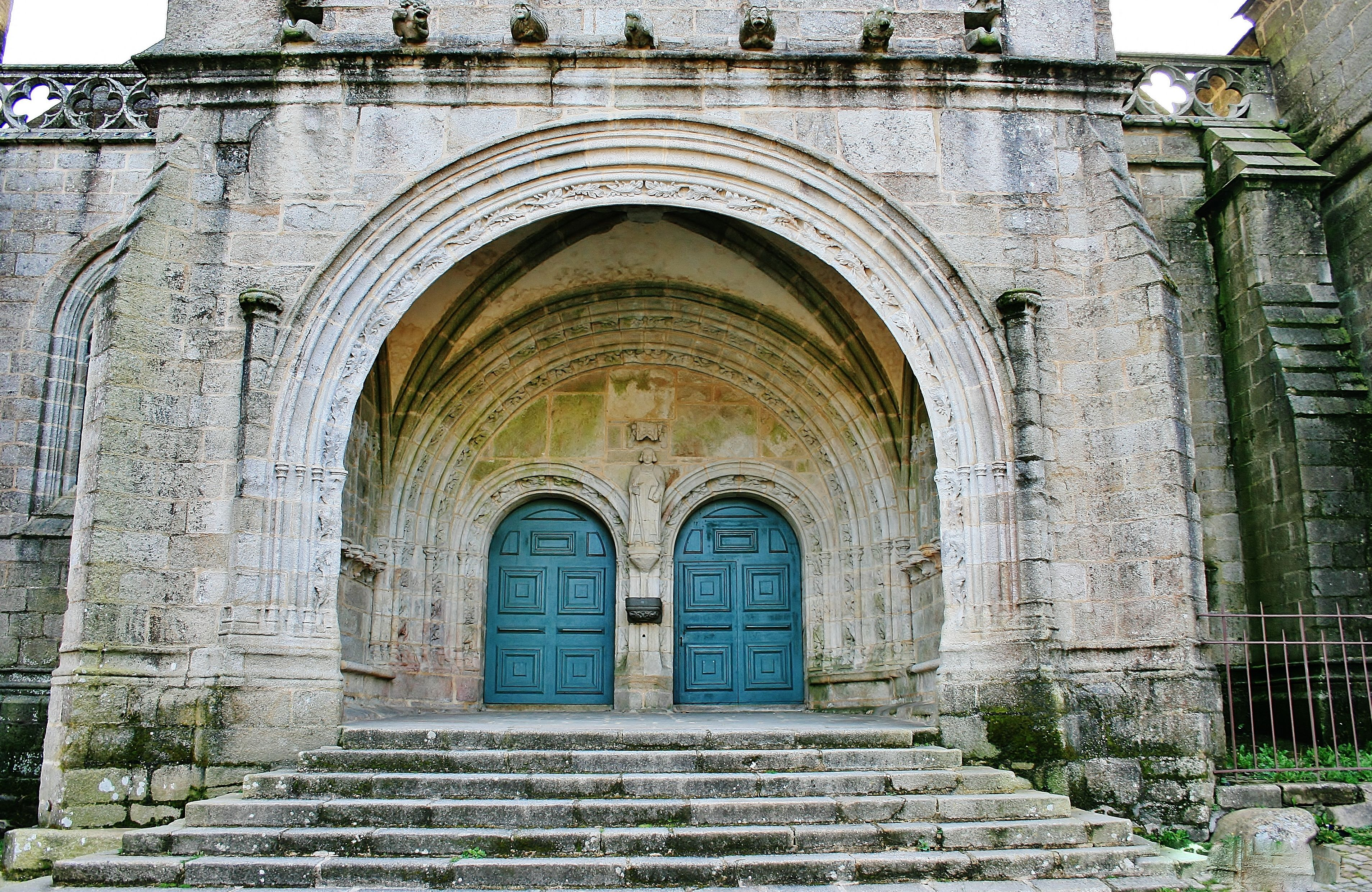 Porche de l'église Saint Ronan. Locronan. Finistère